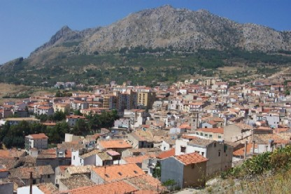 Panoramica di Piana degli Albanesi. Foto scattata da me.